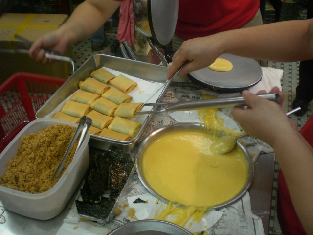 鉅記餅家蛋捲, 加豬肉鬆.